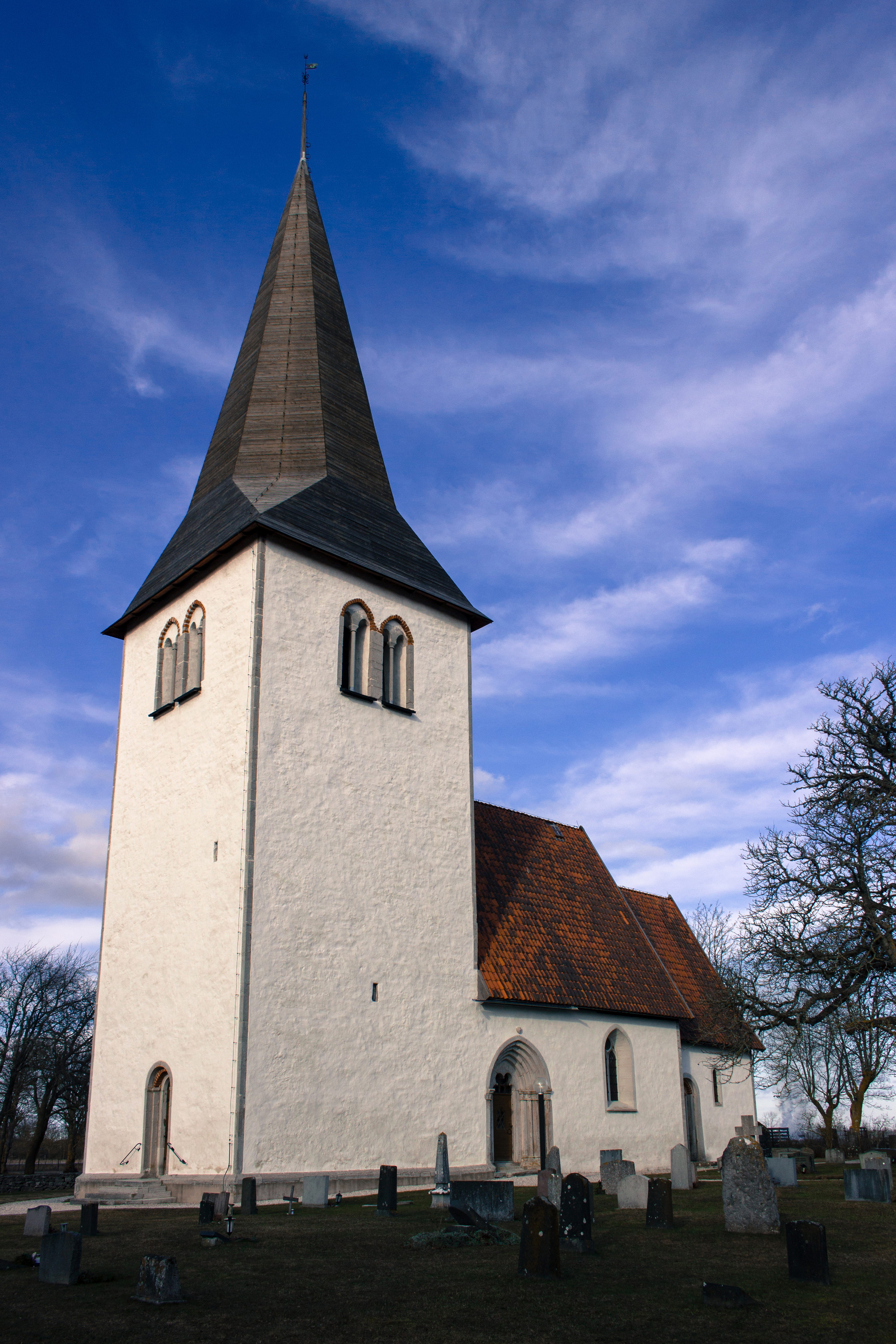 Igrexa de Hangvar, na illa sueca de Gotland.